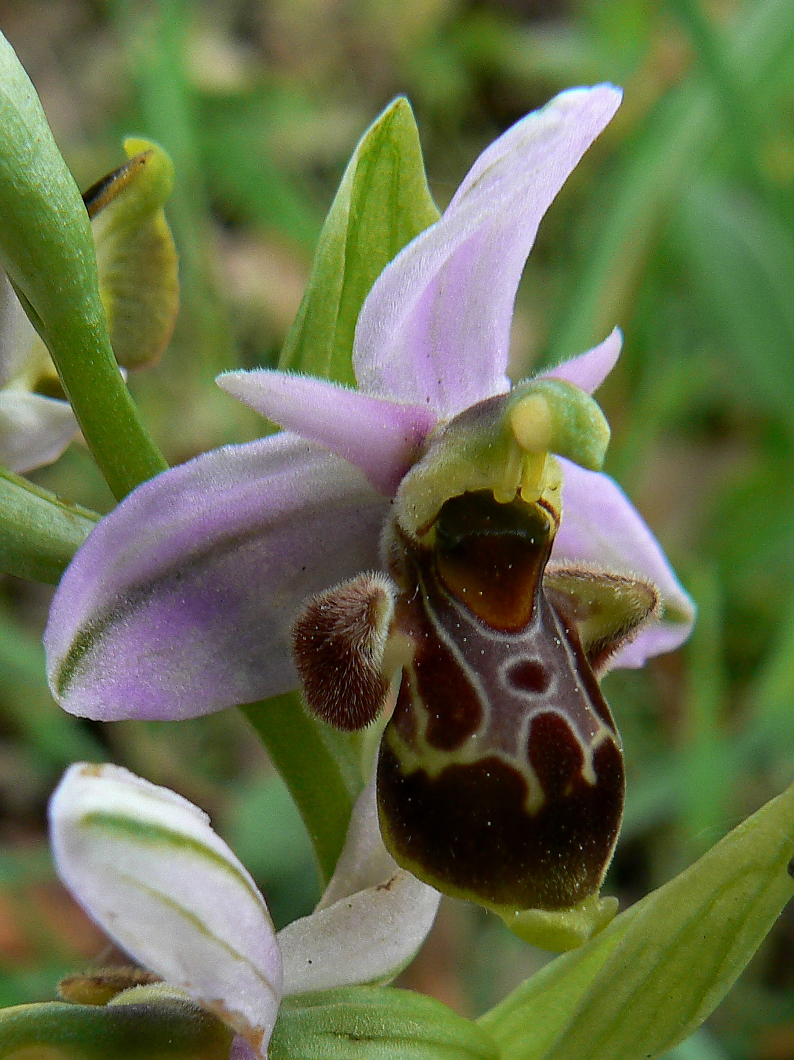 Ophrys × vetula, Plaine des Maures, Var, France. Detail of flower.